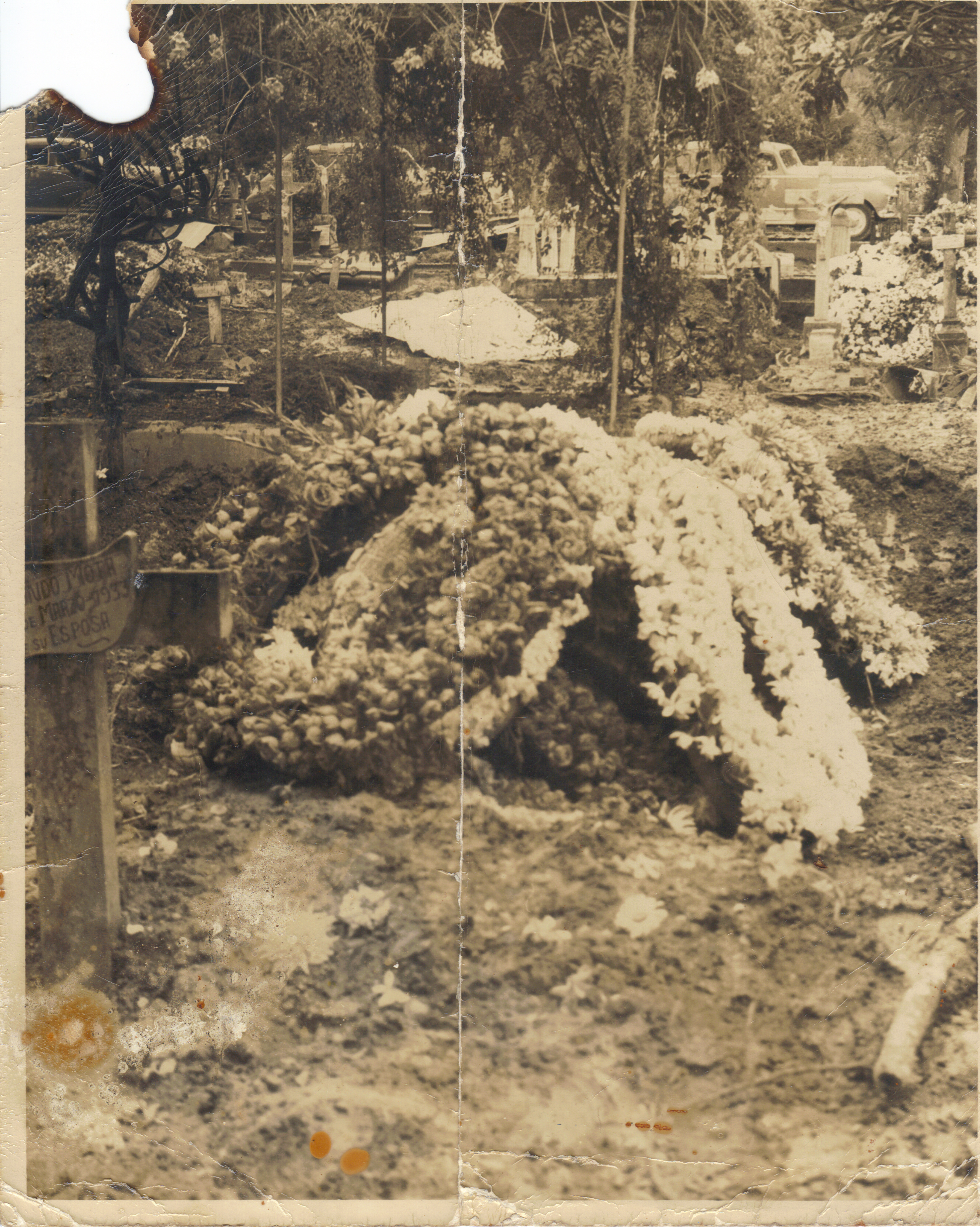 Entierro de José Silva Martínez en Caracas.